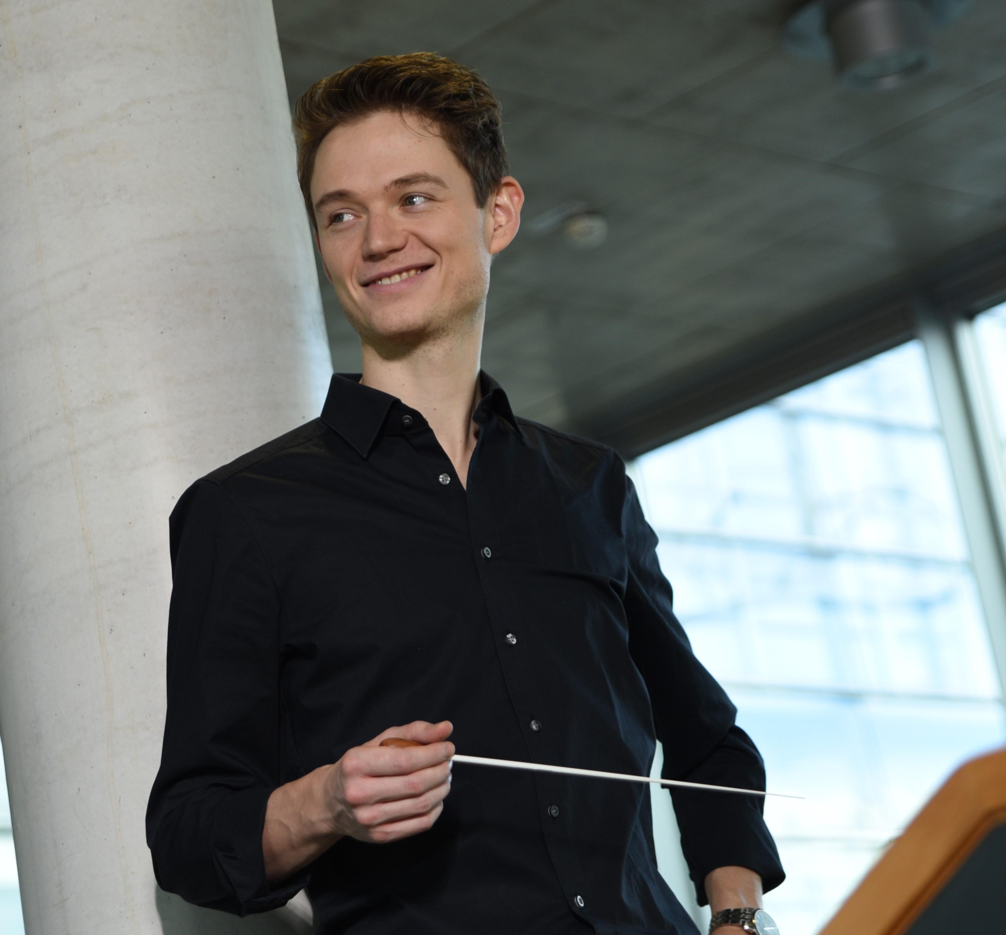 Der Dirigent Felix MildenbergerDepicted person: Felix Mildenberger